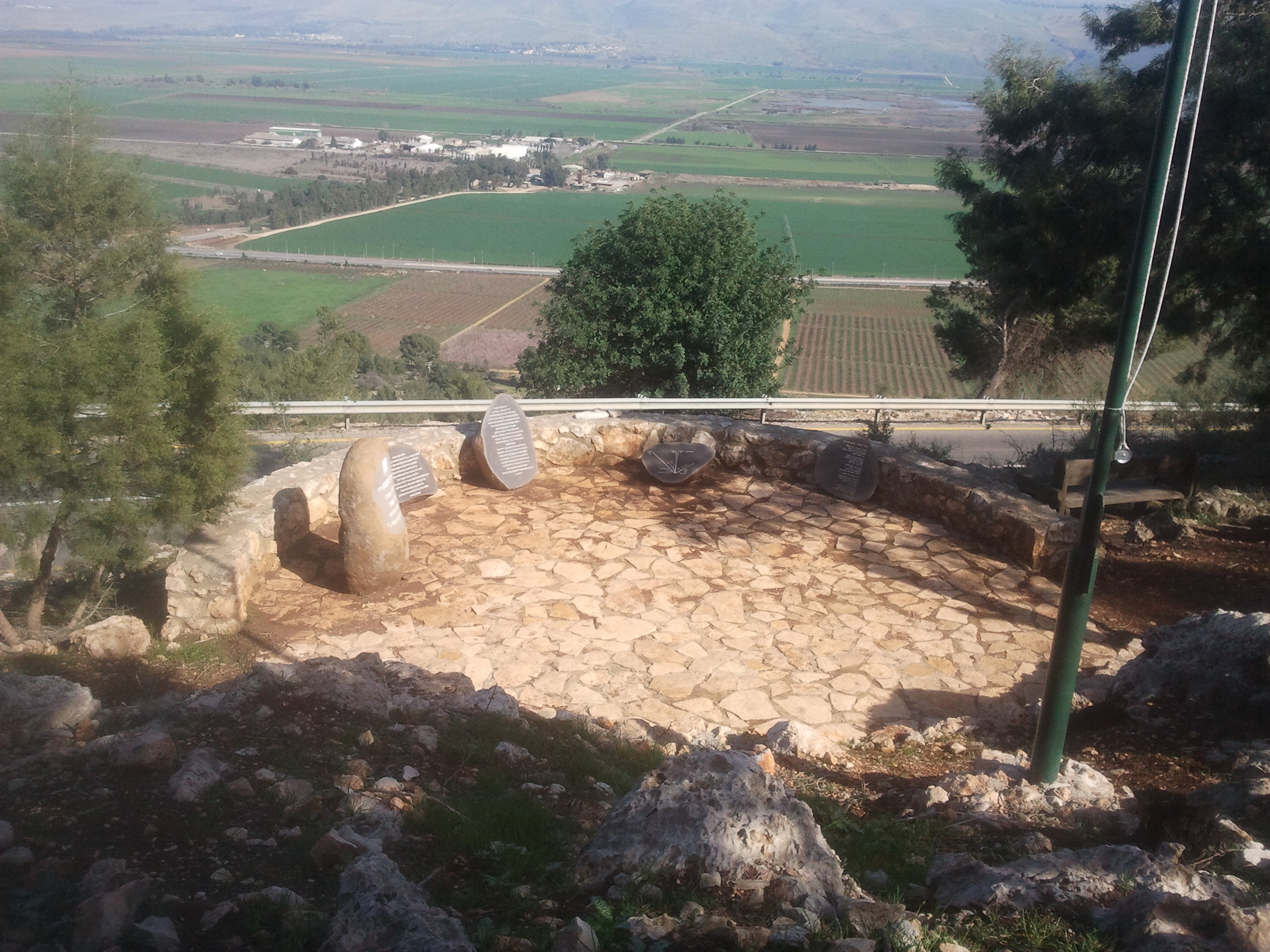 מצפה רן, הוא נקודת תצפית ואתר זיכרון לזכרו של הטייס רס"ן רן כוכבא שנפל עם מסוקו במהלך מלחמת לבנון השנייה ליד כביש 899 המוביל למצודת כוח ברכס הרי נפתלי הדרך לנקודת הנפילה הוא שביל חידות הכולל 7 חידות הקשורות למקום והפתרון להם מנקודת התצפית ניתן לצפות לעבר עמק החולה ורמת הגולן